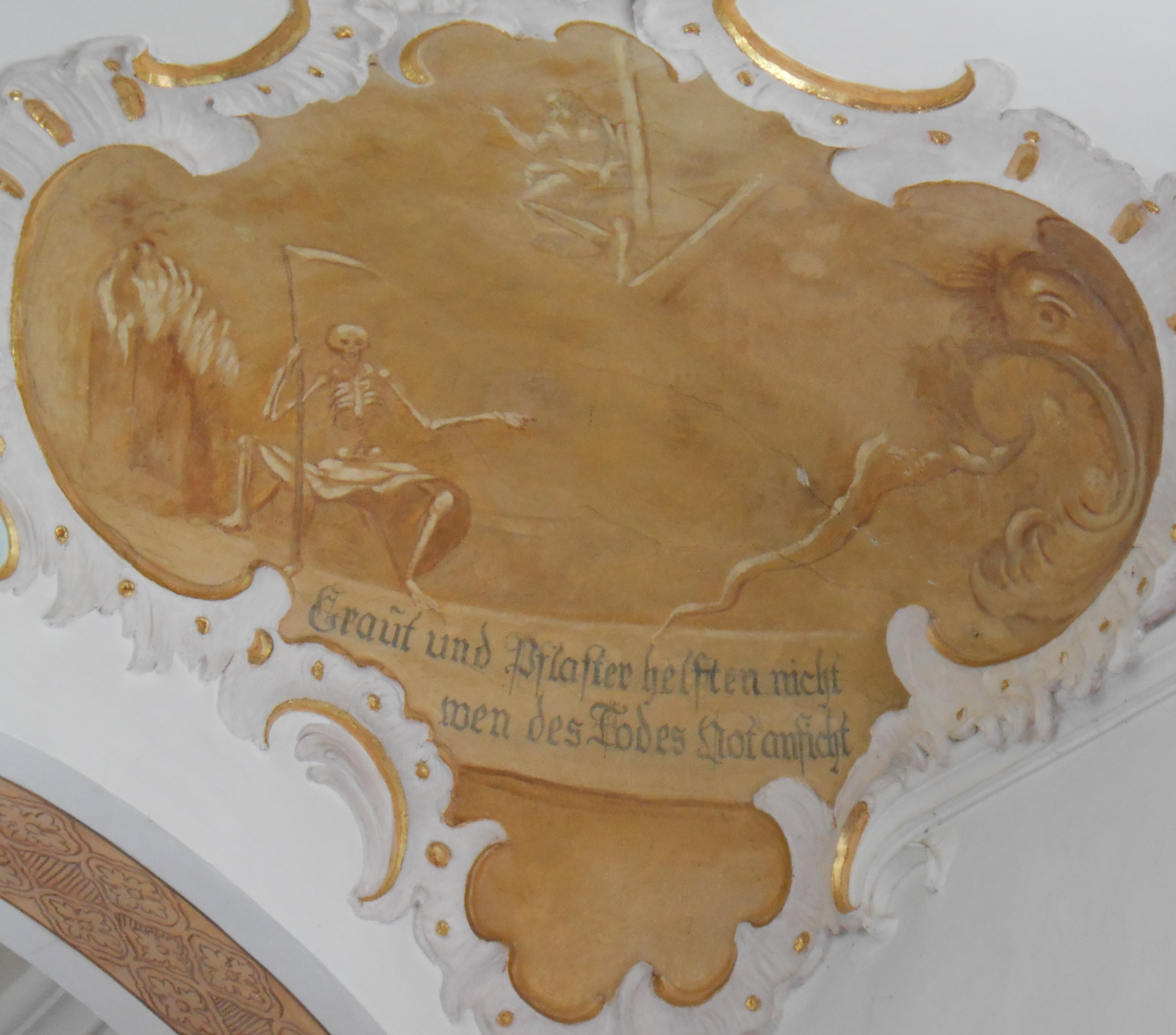 Deckengemälde von Heilig Kreuz (Mindelaltheim)